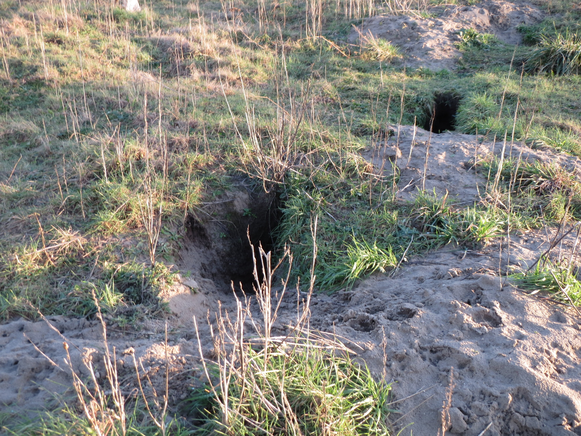 Kaninchenbau bei Hockenheim